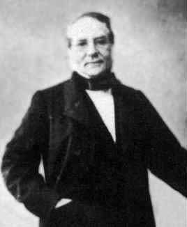 French mathematician Irénée-Jules Bienaymé (1796-1878)